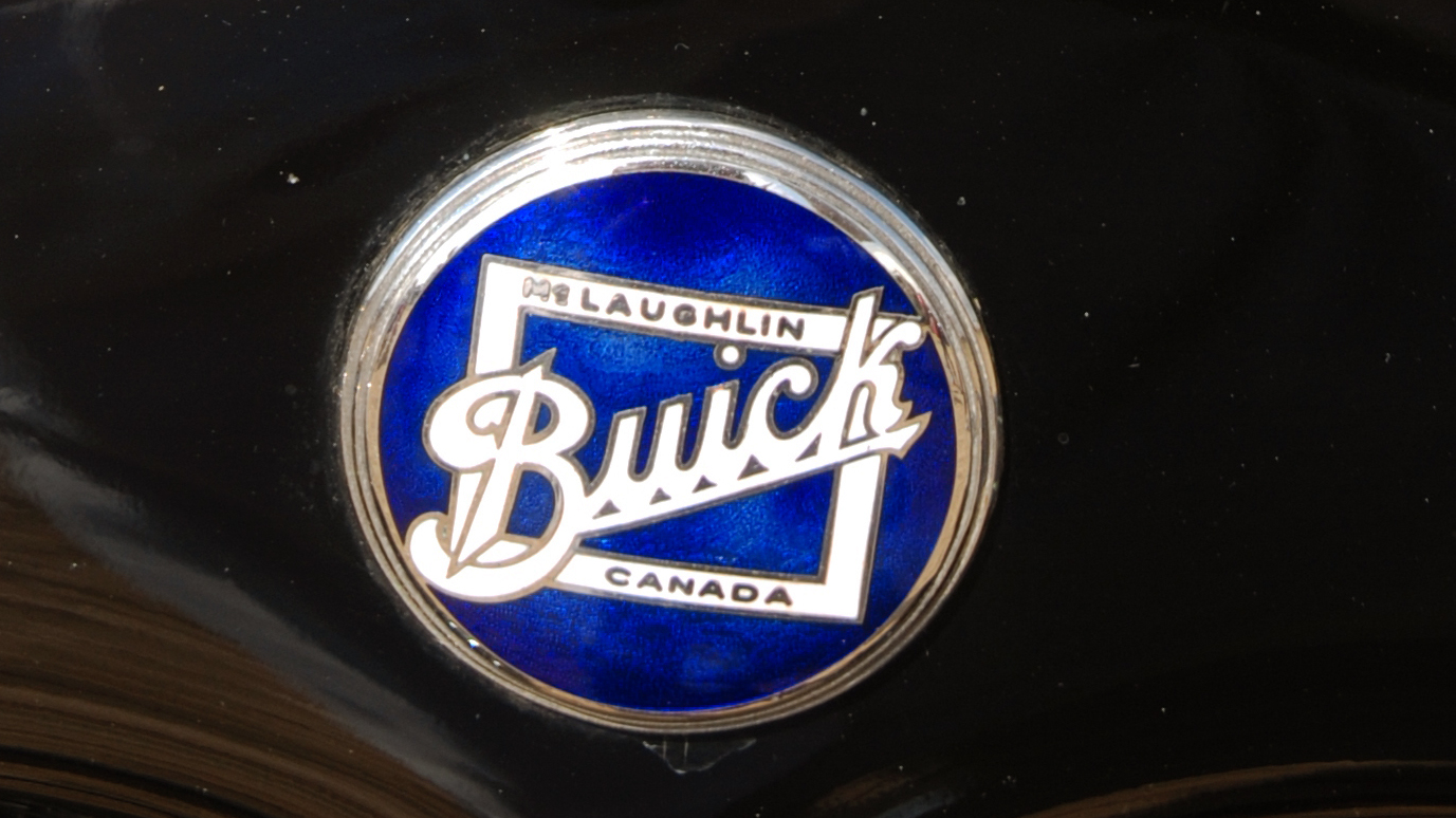 @Shoreham RAFA day 16/9/07